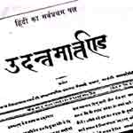 उदंत मार्तंड का मुखपृष्ठ